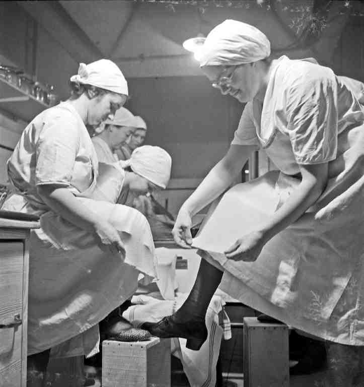 Herstellung von Fasnachtschüechli, Bäckerinnen formen "Chnöiblätze" (übersetzt etwa Knielappen), Bäckerei Gfeller-Rindlisbacher